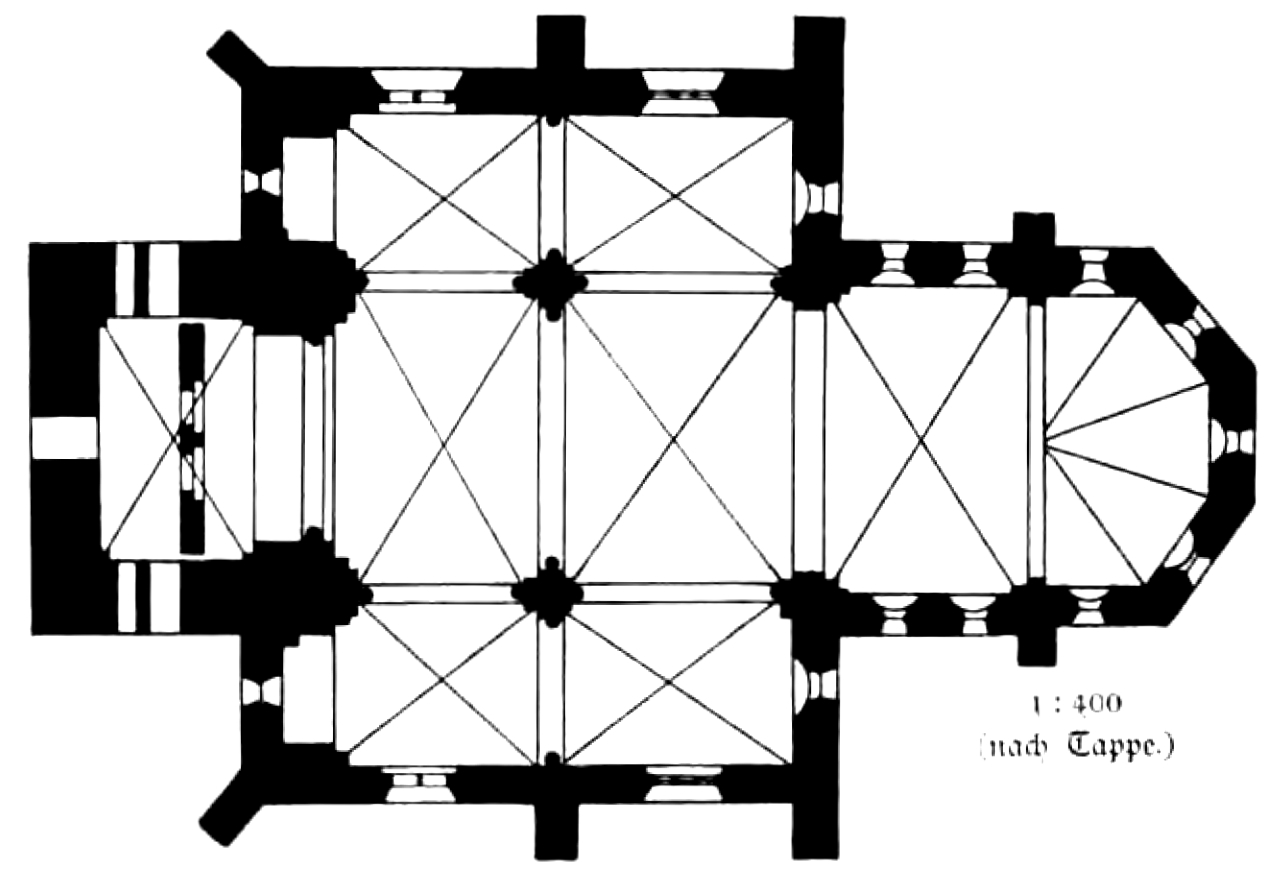 Grundriß der ehemaligen Kirche St. Georg in Soest. 1:400 nach Tappe.